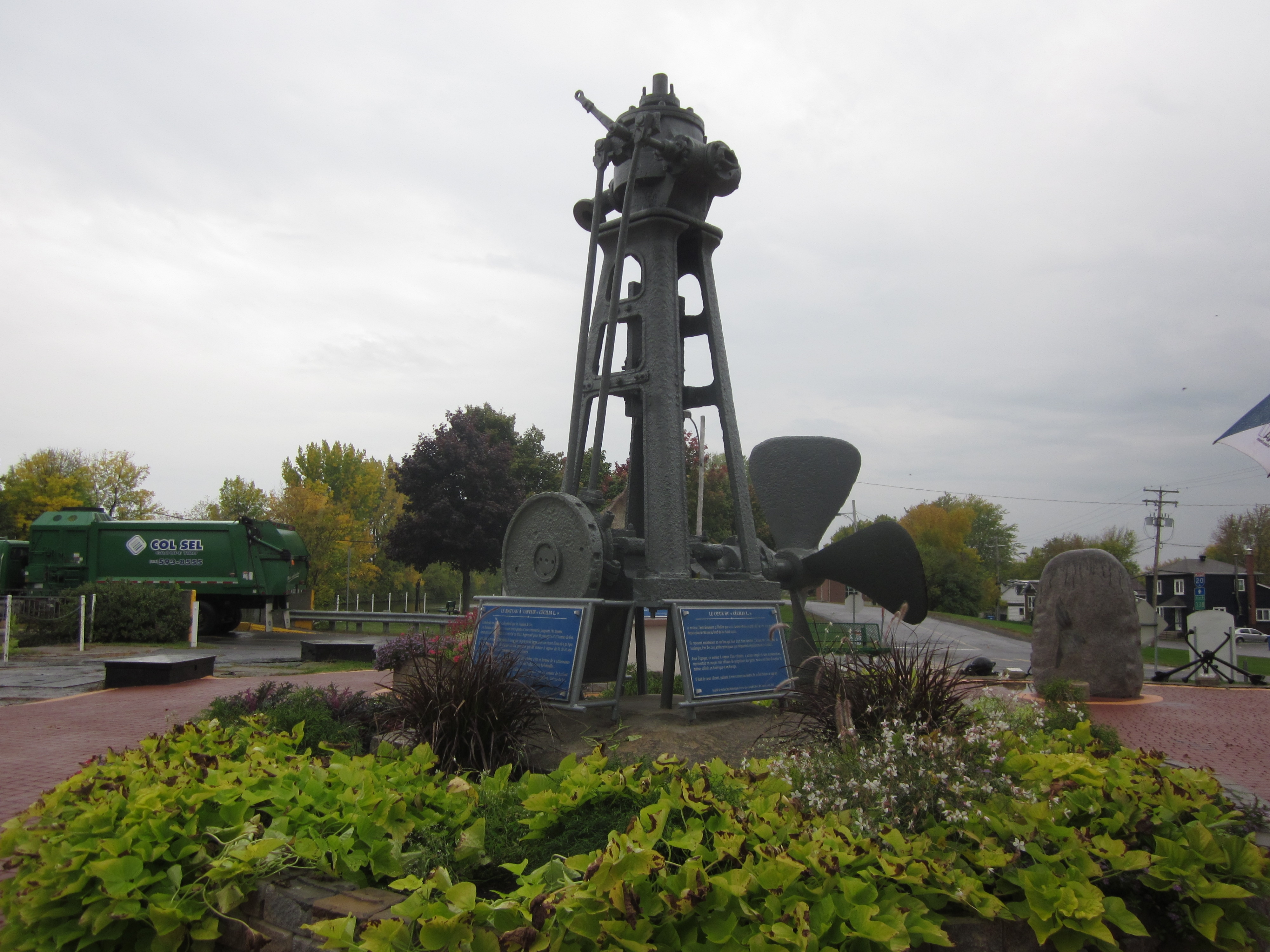 Moteur, entrainement et hélice du Cécilia L. récupéré en 2007 du bateau ayant sombré le 1er novembre 1912 dans le lac Saint-Louis.